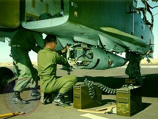 OV-10A Bronco BuNo 155xxx, GPU-2/A gun pod, China Lake, 29 June 1972, Official U.S. Navy photo (lt. Quelle)